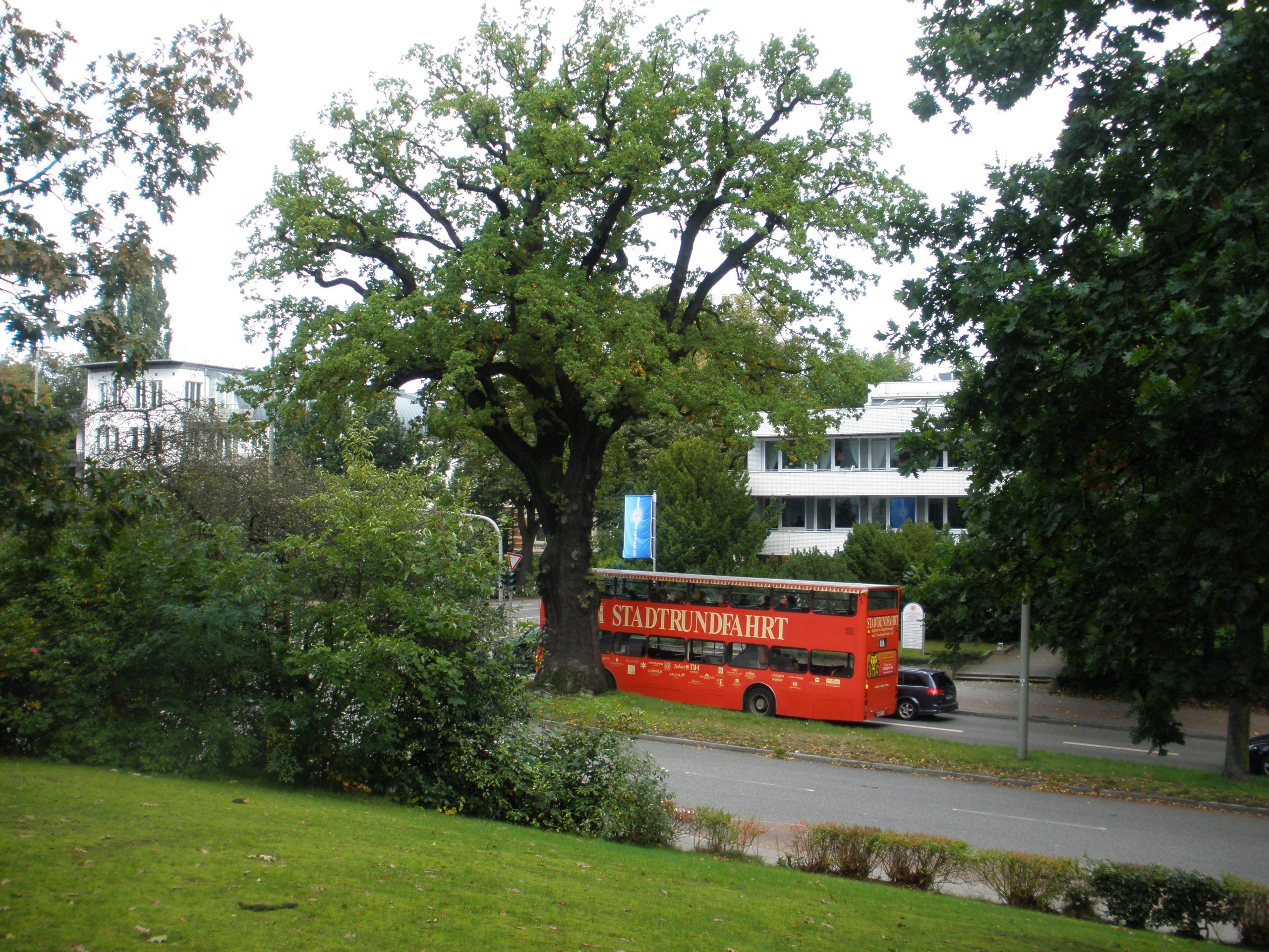 Roter Bus der Stadtrundfahrt Hamburg am Harvestehuder Weg